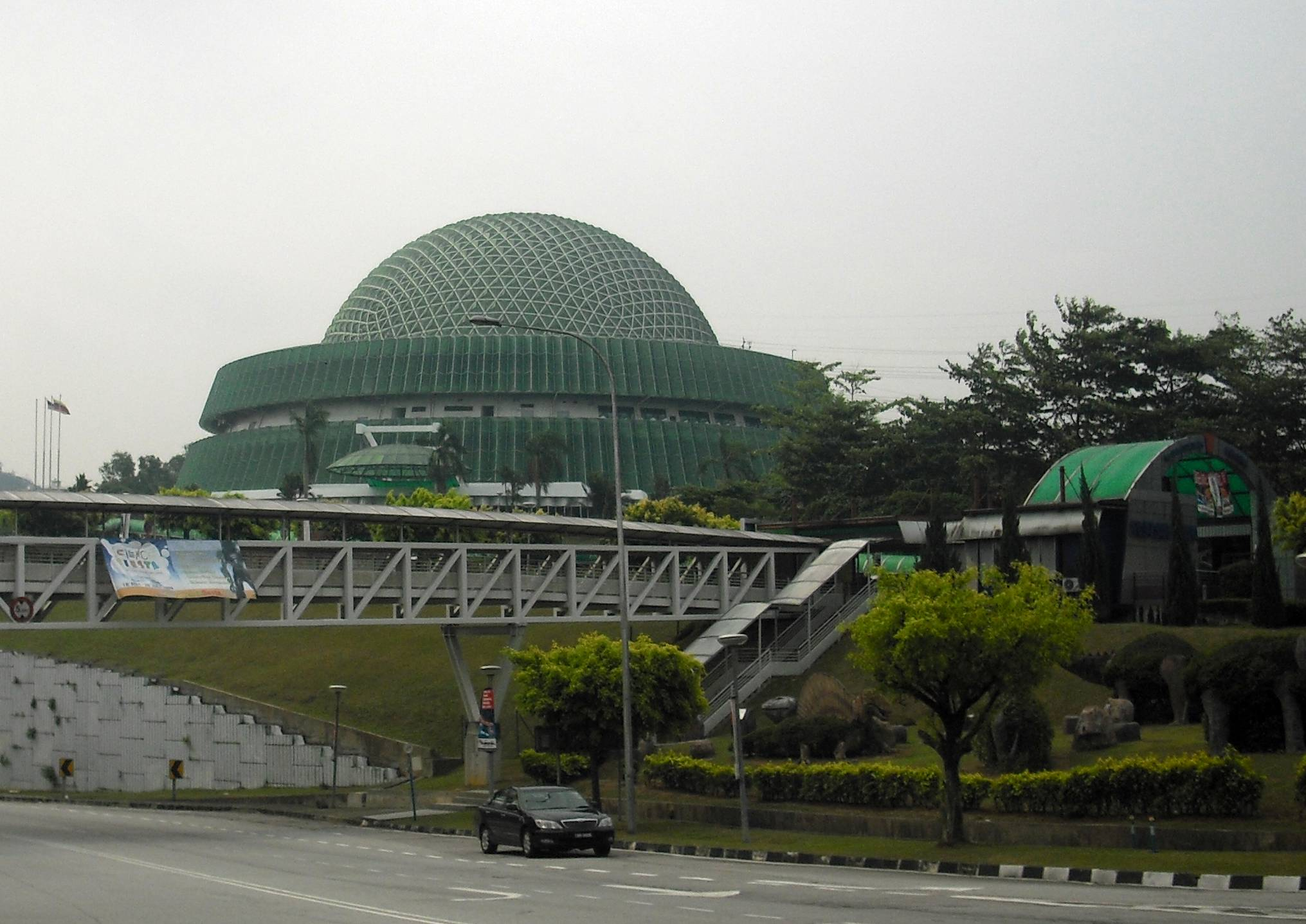 Pusat Sains Negara, National Science Centre, Kuala Lumpur, Malaysia.